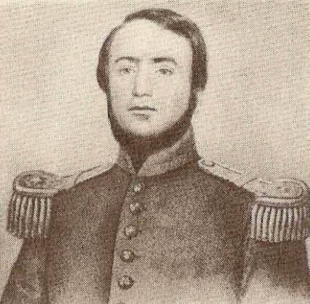 Pedro Alcántara Urriola Balbontín; político y militar chileno. Nació en Santiago, el 22 de febrero de 1797. Falleció en la misma ciudad, el 20 de abril de 1851. Hijo de don Luis Miguel de Urriola y de doña Josefa Balbontín de la Torre. Se casó con Rosario Guzmán Fontecilla, y en segundas nupcias con Carmen Valdivieso Gormaz, con ambas tuvo descendencia.